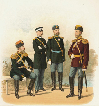 Армейские Драгунские полки: Штаб-Офицеры полков а) 37-го Военного Ордена ( в парадной форме ) и б) 36-го Ахтырского ( в обыкновенной форме ), Обер-Офицеры а) 32-го Чугуевского ( в сюртуке ) и б) 6-го Павлоградского Его Величества ( в обыкновенной форме ) ( прик. по воен. вед. 1882 г. № 325. )